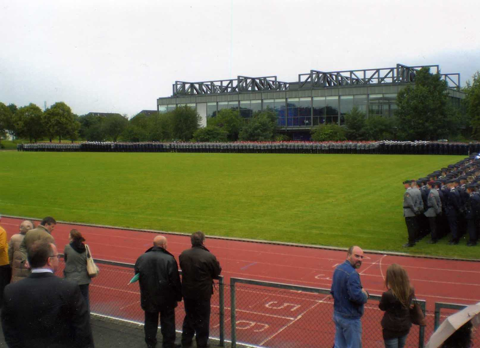 Leutnantsbeförderung für studierende Offizieranwärter Luftwaffe und Marine 2007 auf dem Sportplatz HSU